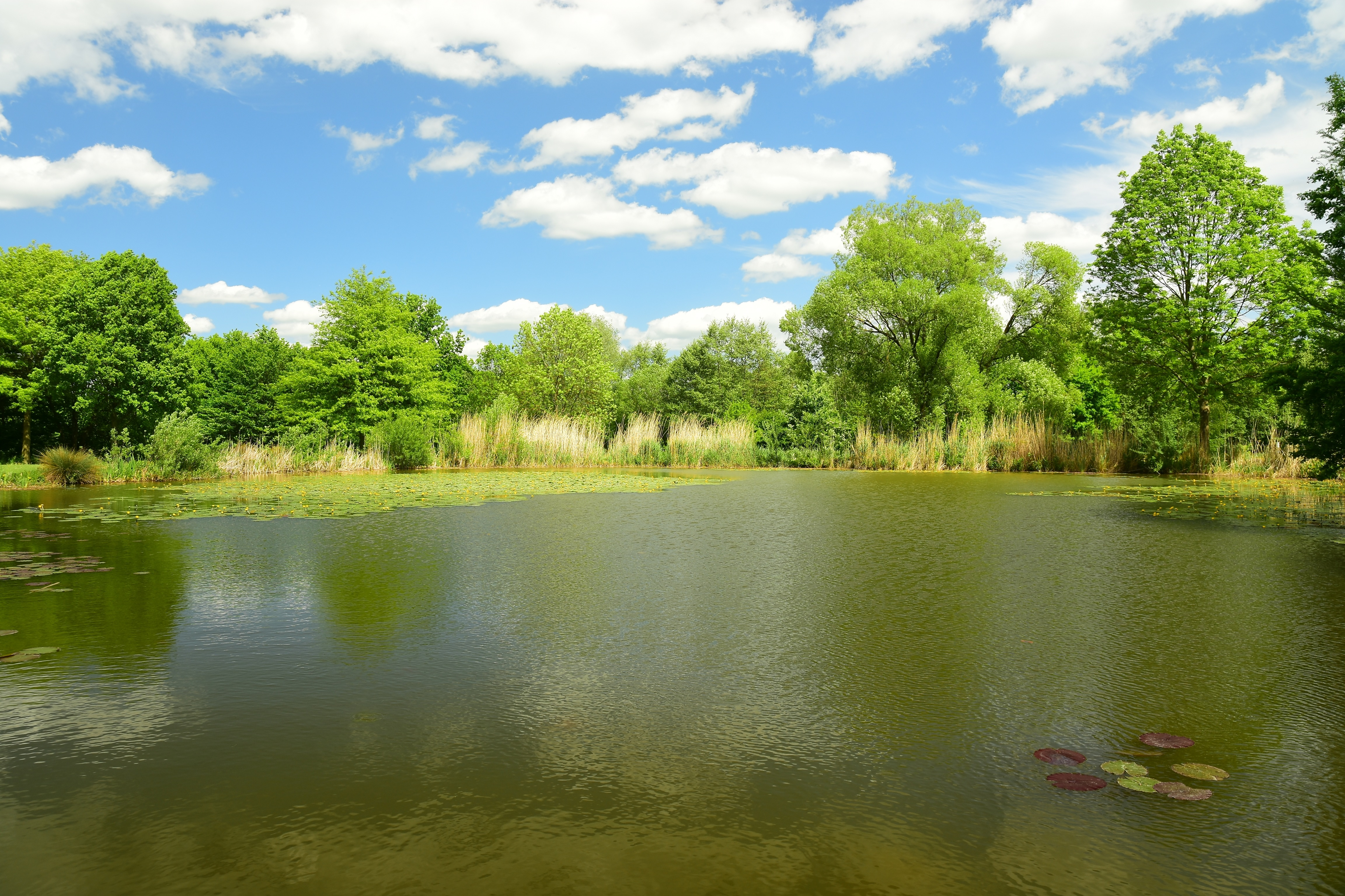 Landschaftsschutzgebiet "Stadtkreis Fulda", Fulda Auen